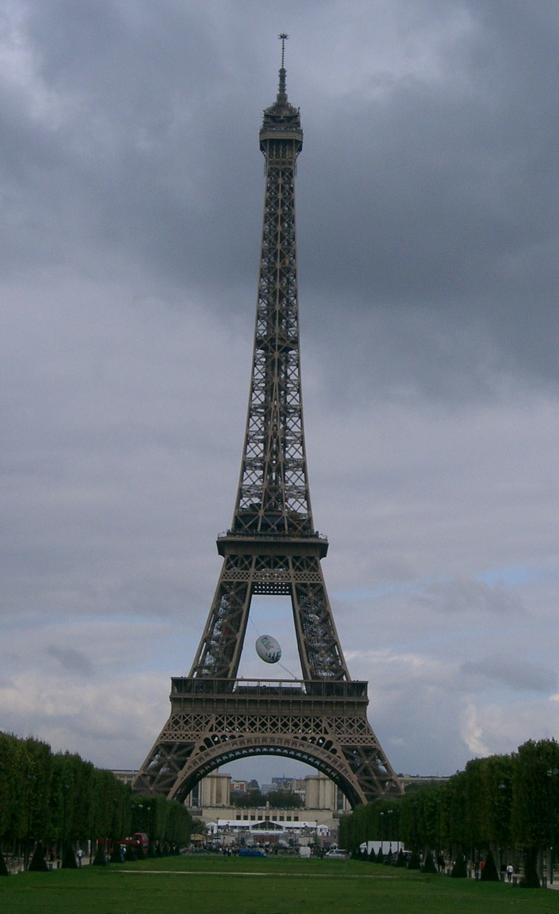 Tour Eiffel avec ballon géant pour la coupe du monde de rugby Paris 2007